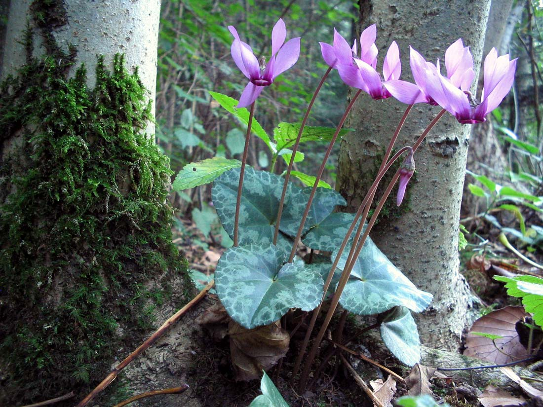 Cyclamen - Alpenveilchen; Fundort: Österreich/OÖ–/Steyr